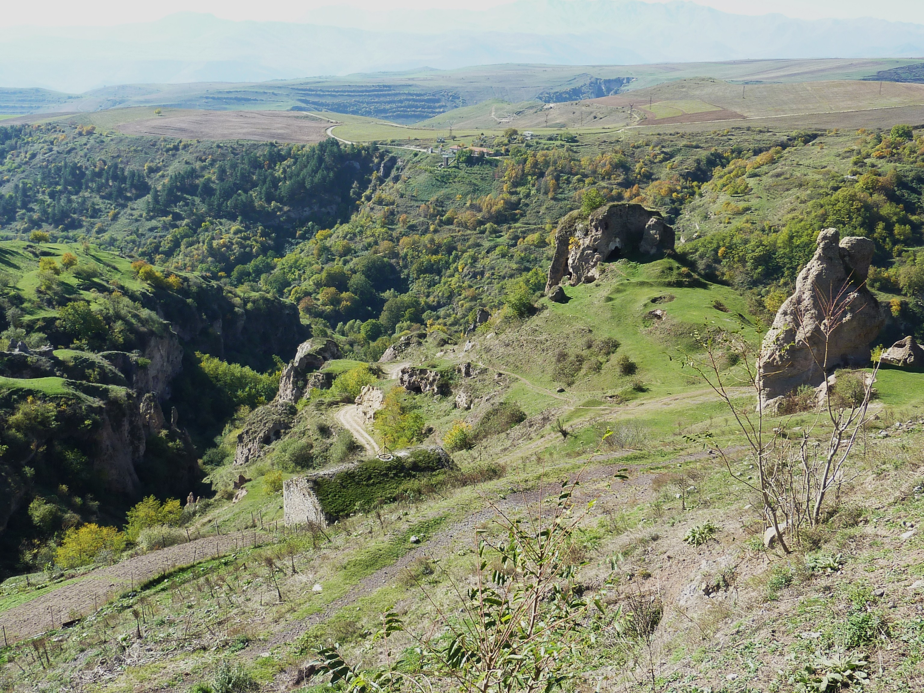 Khendzoresk : vue d'ensemble du site